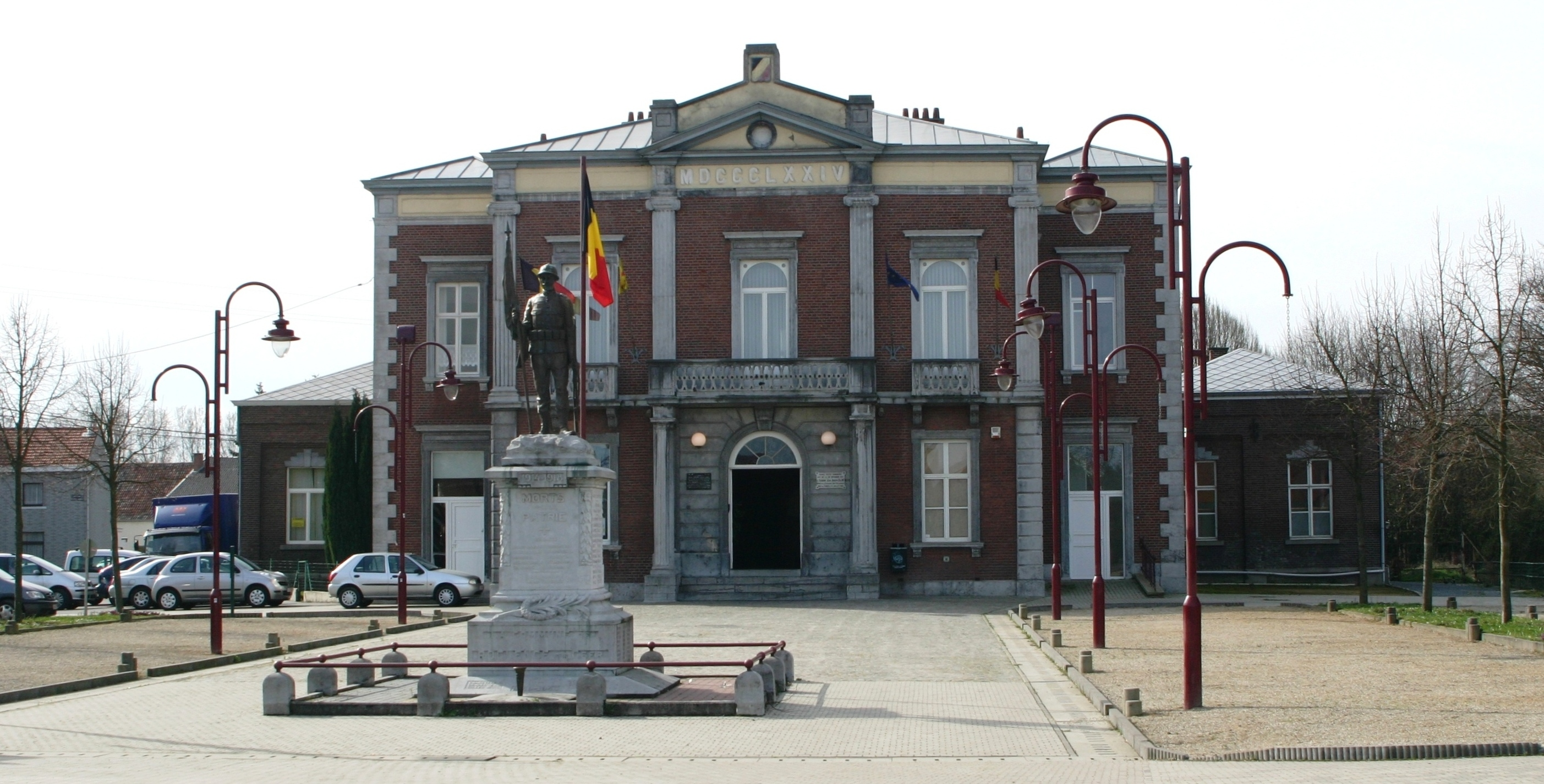 D'Gemengepaz vu Roclenge. Kategorie:Fréier Gemengen an der Provënz Léck Roclenge Gemengeplaz